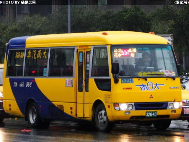 大南汽車551路線.326-AD.